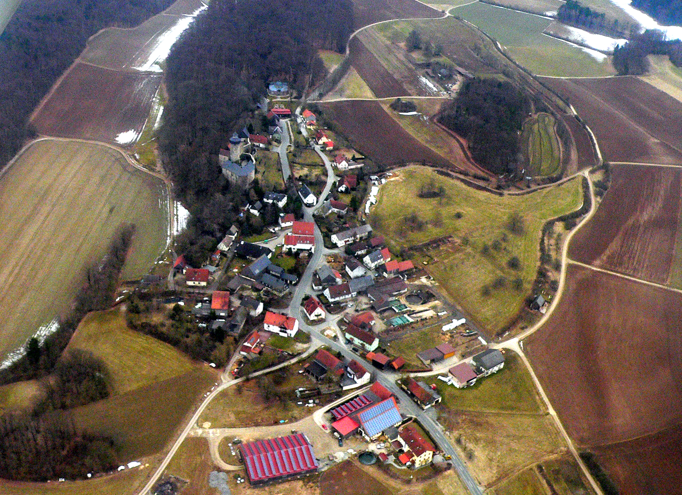 Felsengarten Sanspareil, Westansicht mit Burg Zwernitz - Fränkische Schweiz, Bayern